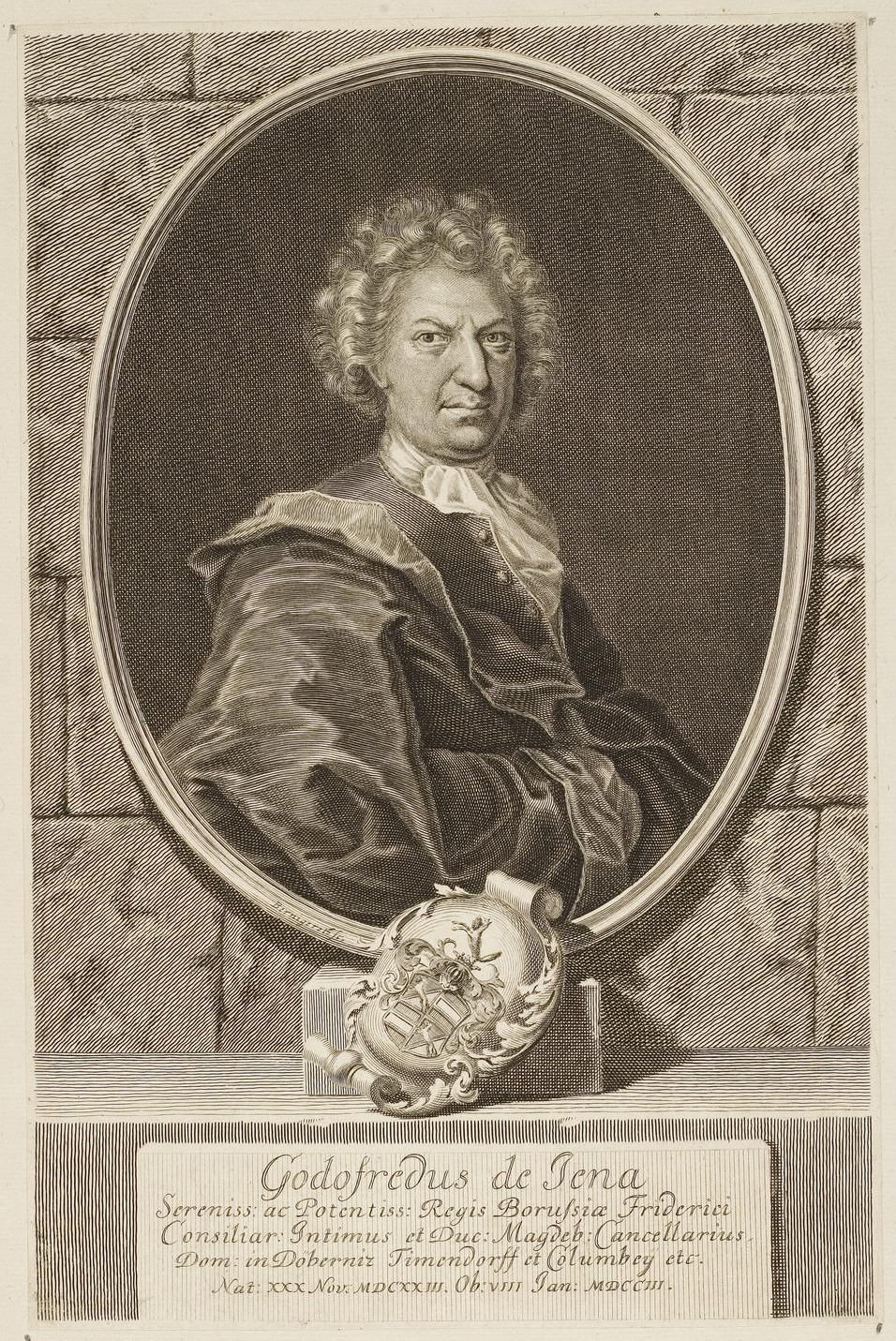 Grafik aus dem Klebeband Nr. 1 der Fürstlich Waldeckschen Hofbibliothek Arolsen Motiv: Gottfried von Jena, Diplomat und preußischer Politiker